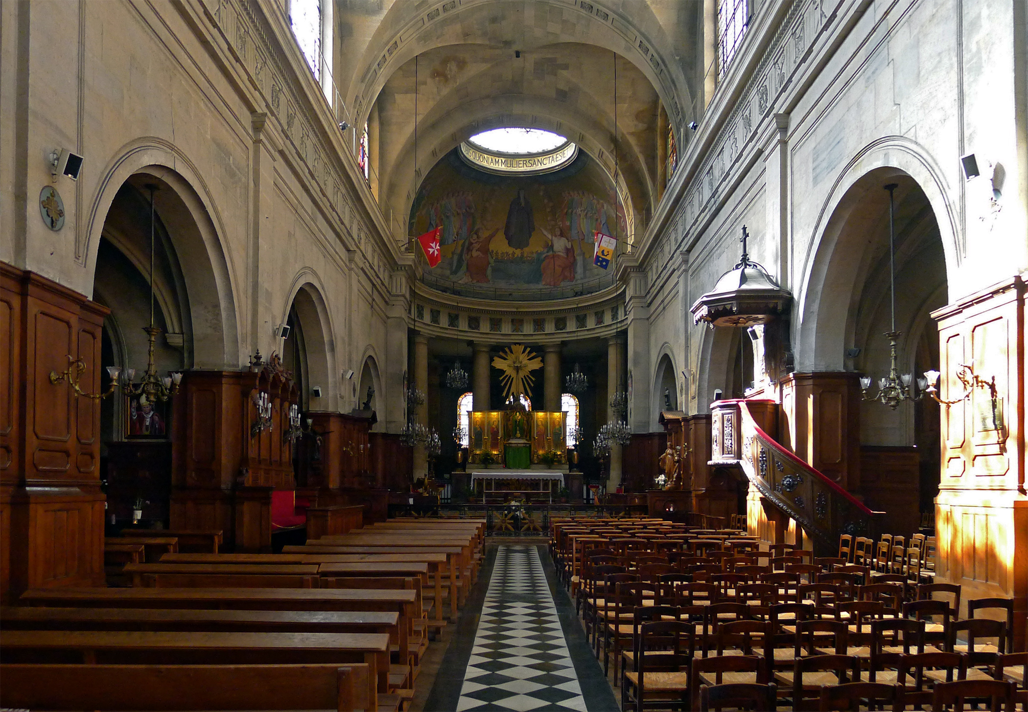 Église Sainte-Élisabeth-de-Hongrie - Paris III .